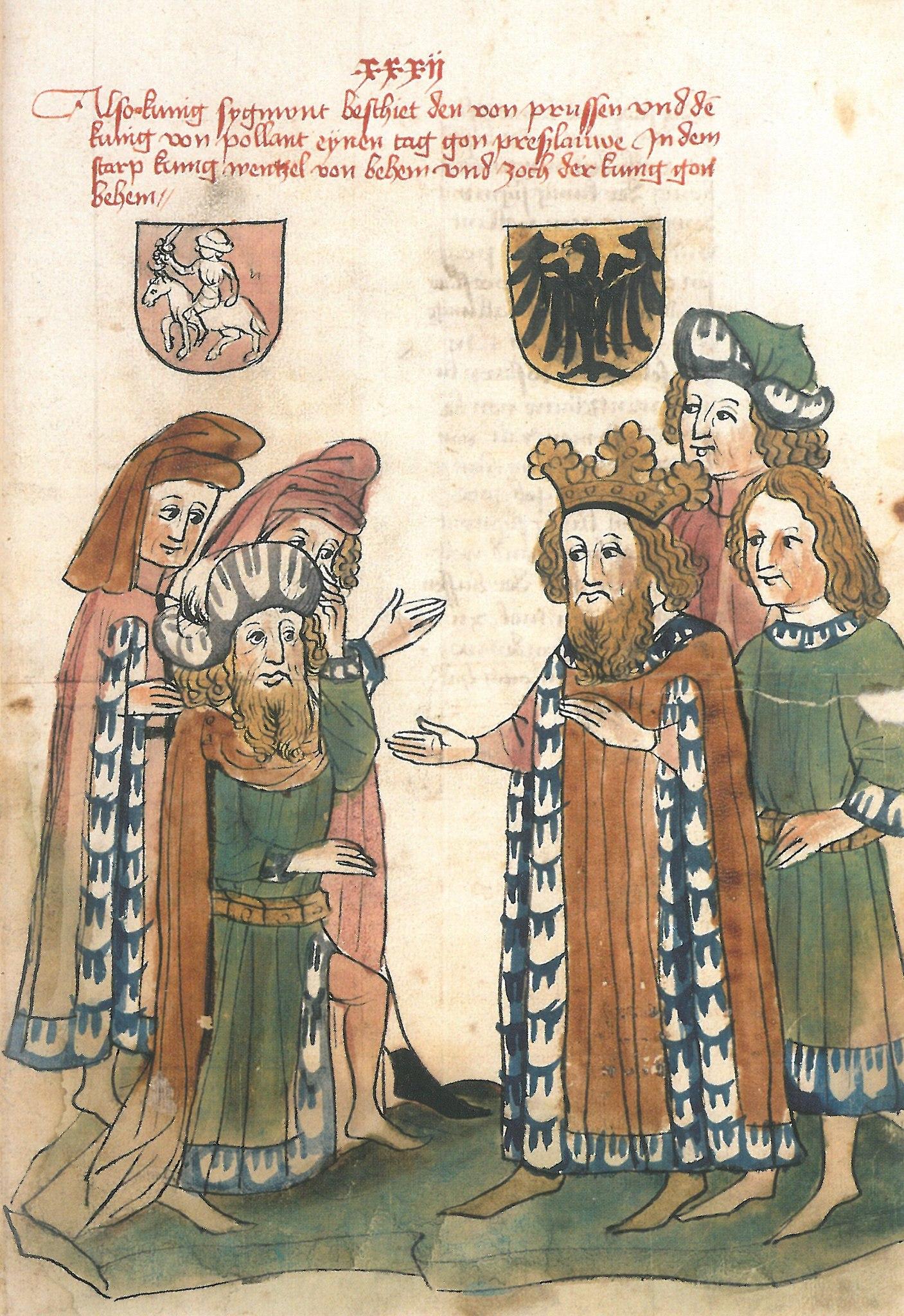 Беларуская (тарашкевіца): Ілюстрацыя з гербам «Пагоня» («Pahonia») да хронікі Сігізмунда, імпэратара Сьвятой Рымскай імпэрыі: «Сігізмунд пасярэднічае паміж Тэўтонскім ордэнам і каралём польскім Ягайлам (Jagajła)»